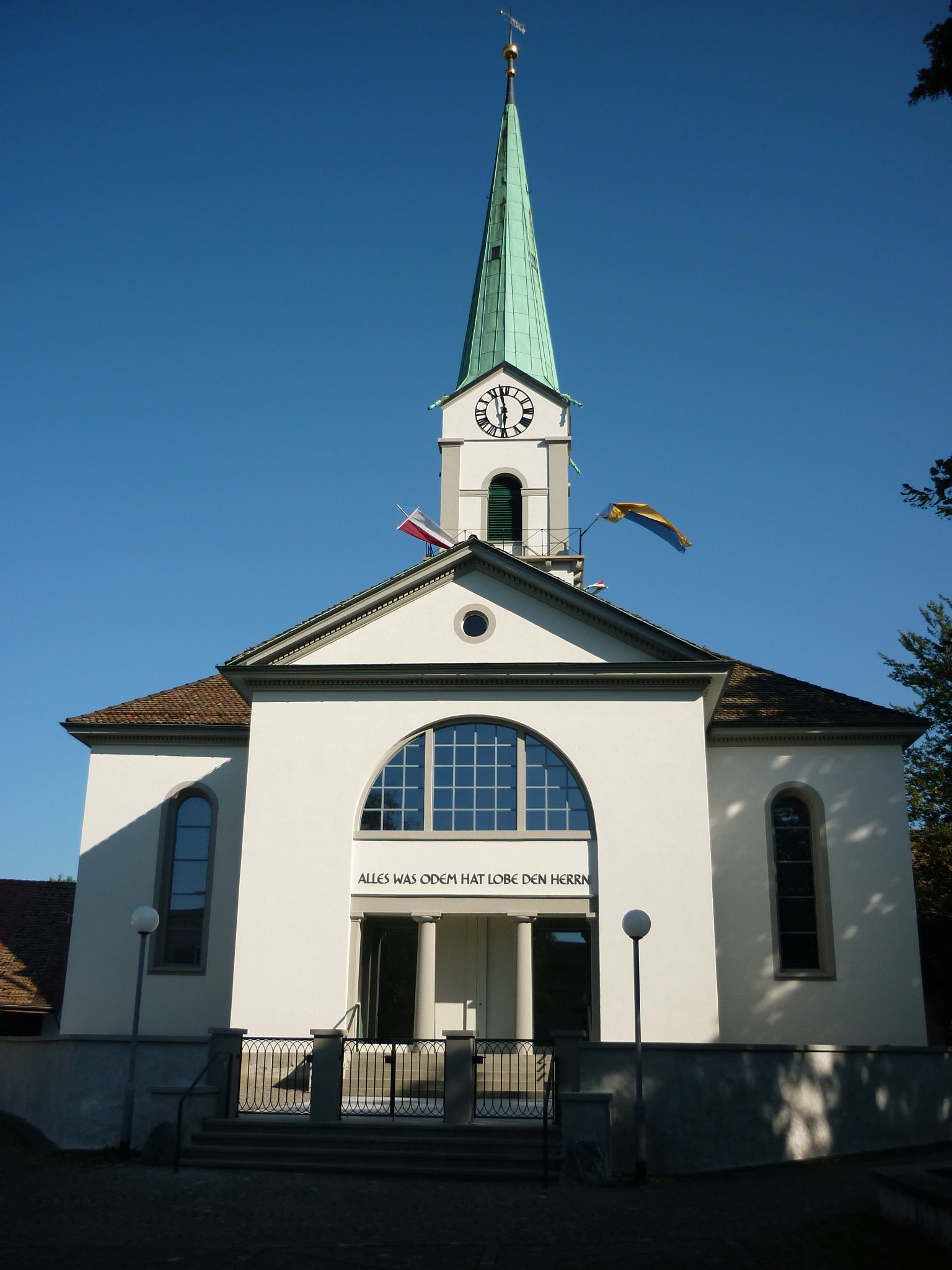 Kirche Albisrieden-Zürich, Schweiz, renoviert 2011